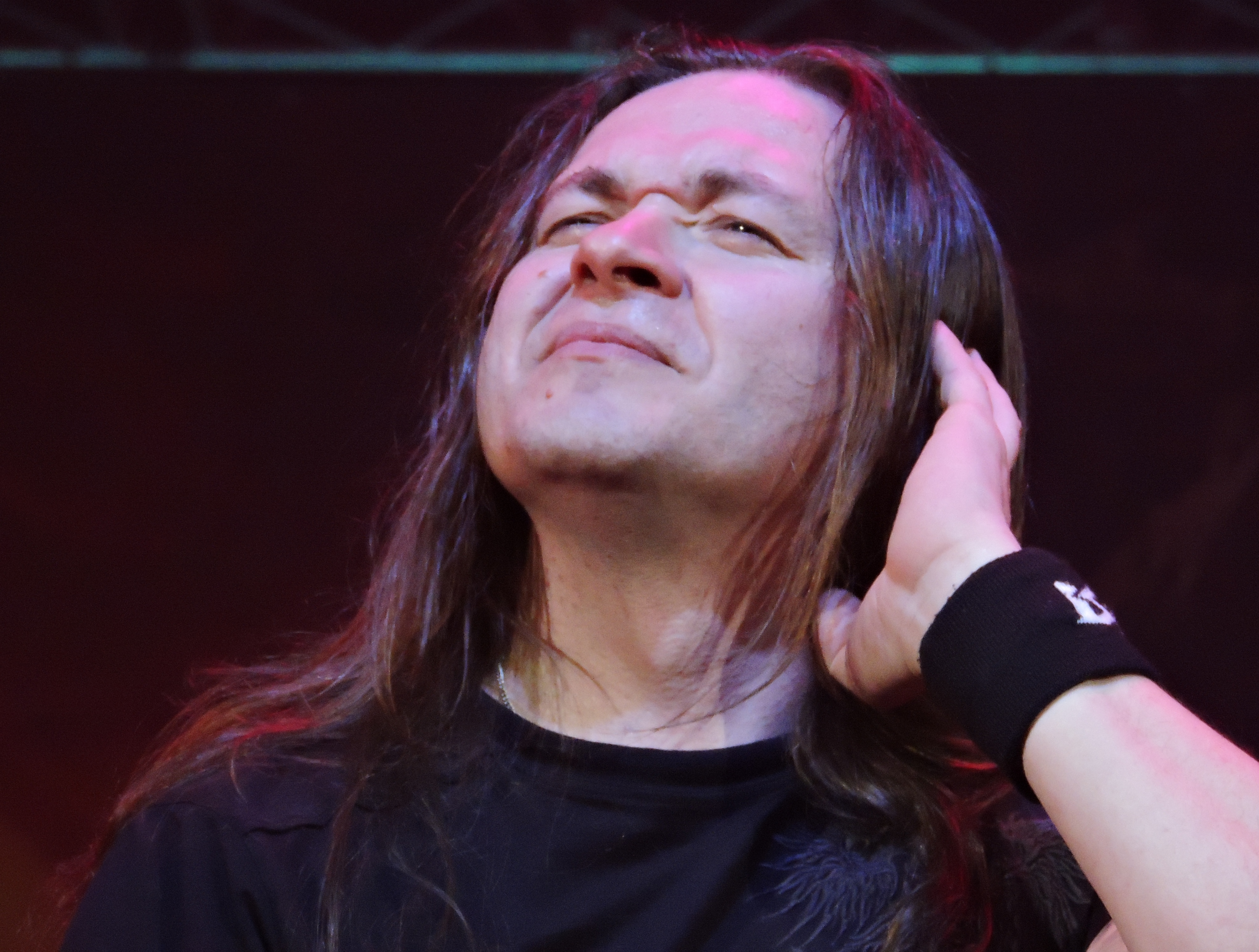 Житняков Михаил